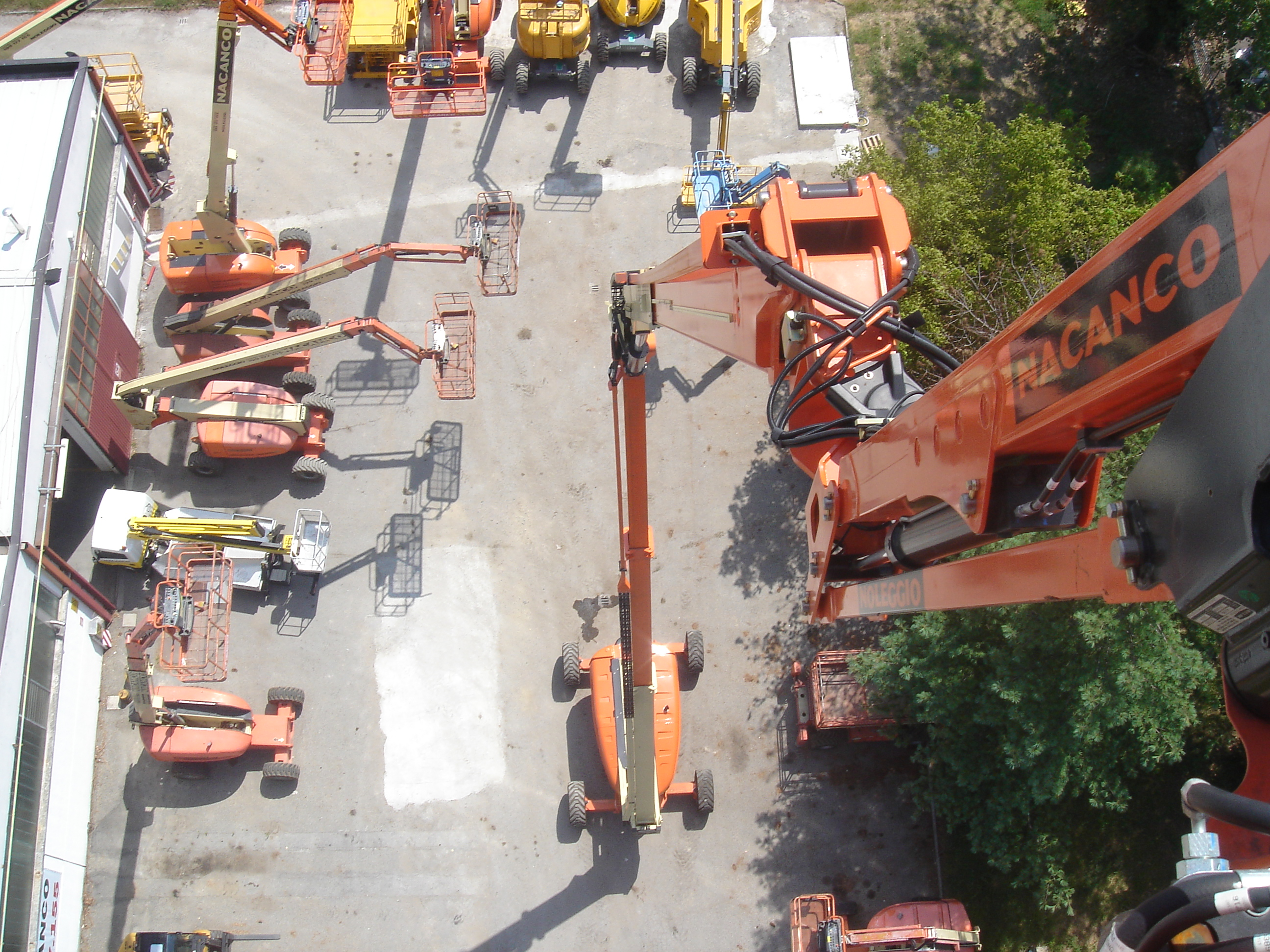 foto fatta da me